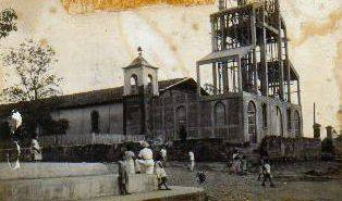 Construccion de Iglesia Parroquial San Juan Nonualco en 1960